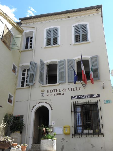 Mairie de Montferrat (83)